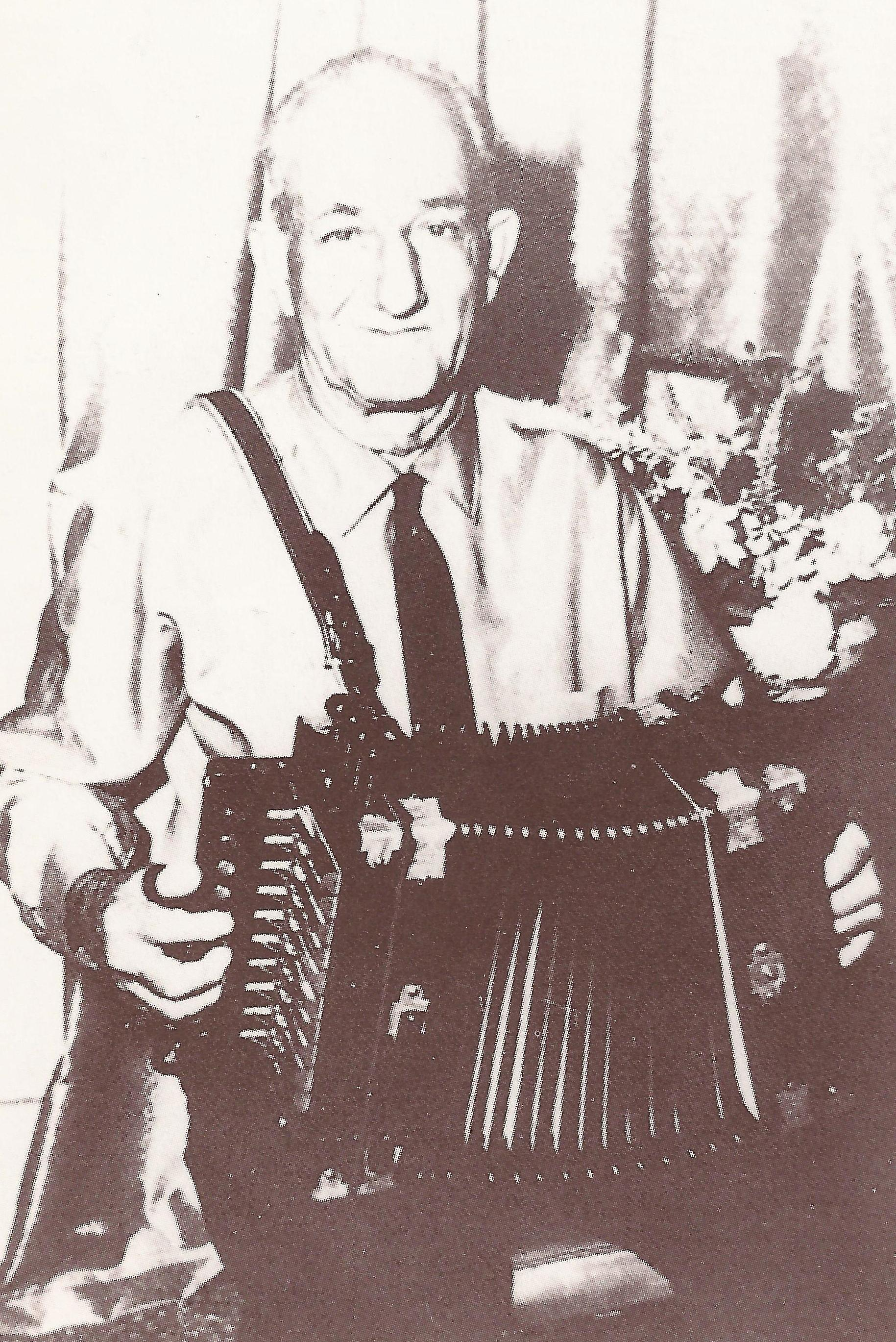 Amede Breaux in 1967.